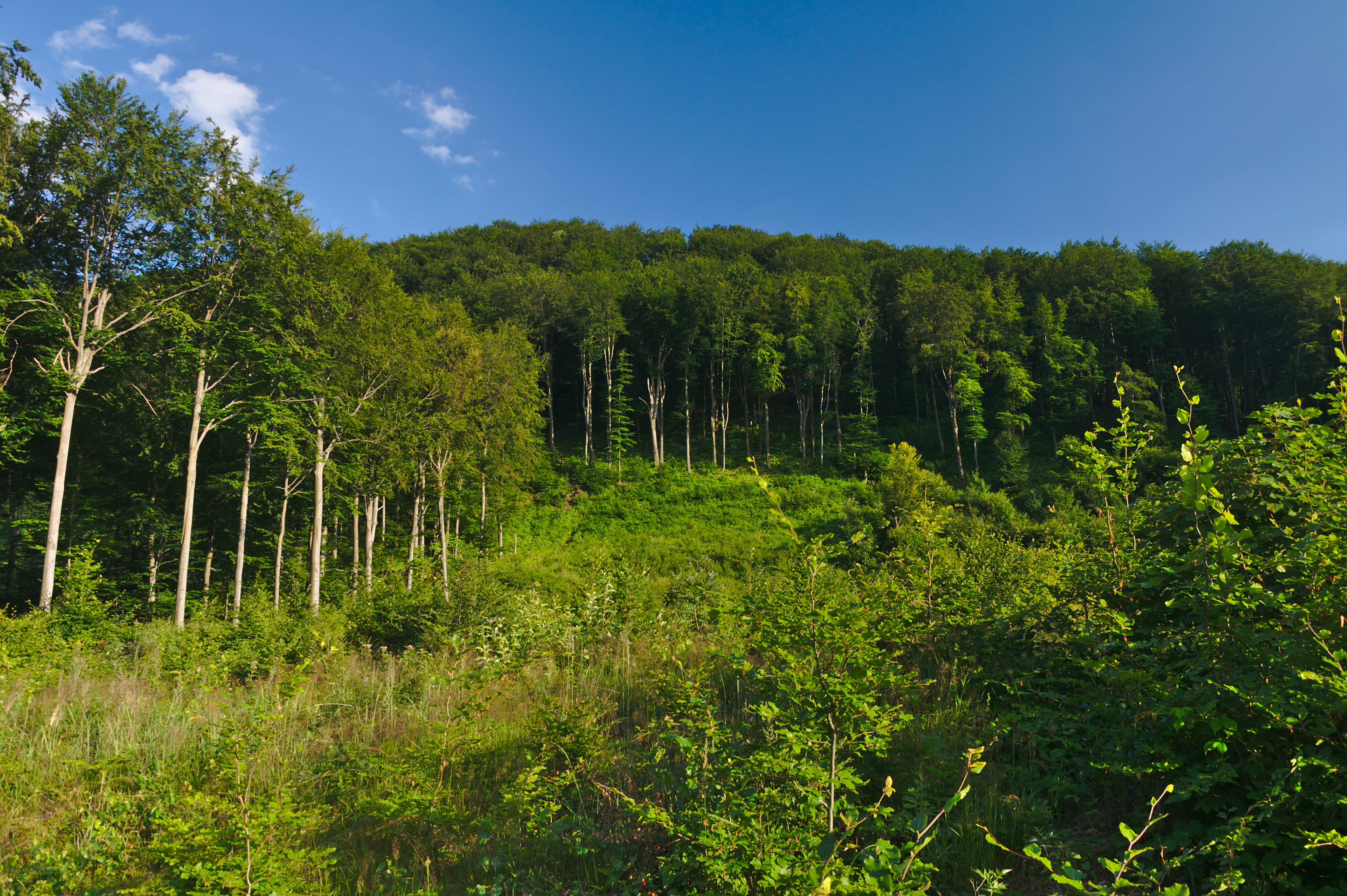 Severná strana kopca Nežabec, CHKO Vihorlat